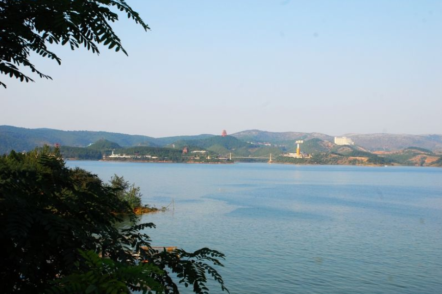 Dan river in China